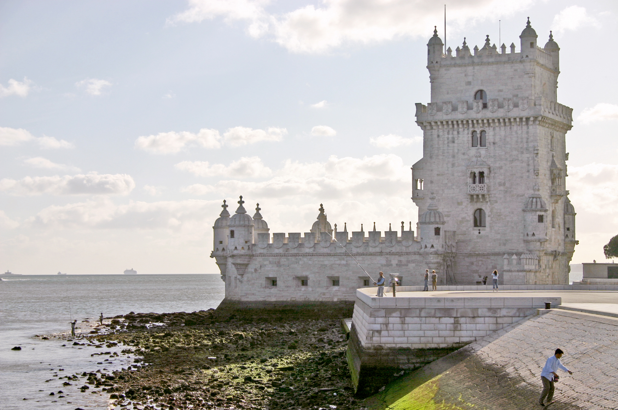 Den Torre de Bélem.